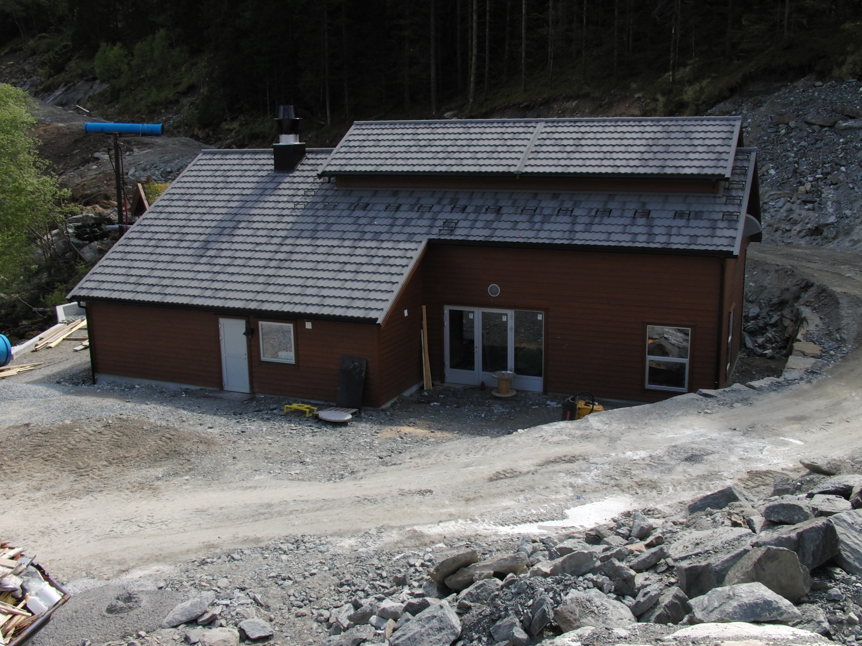 Steindal kraftverk under bygging